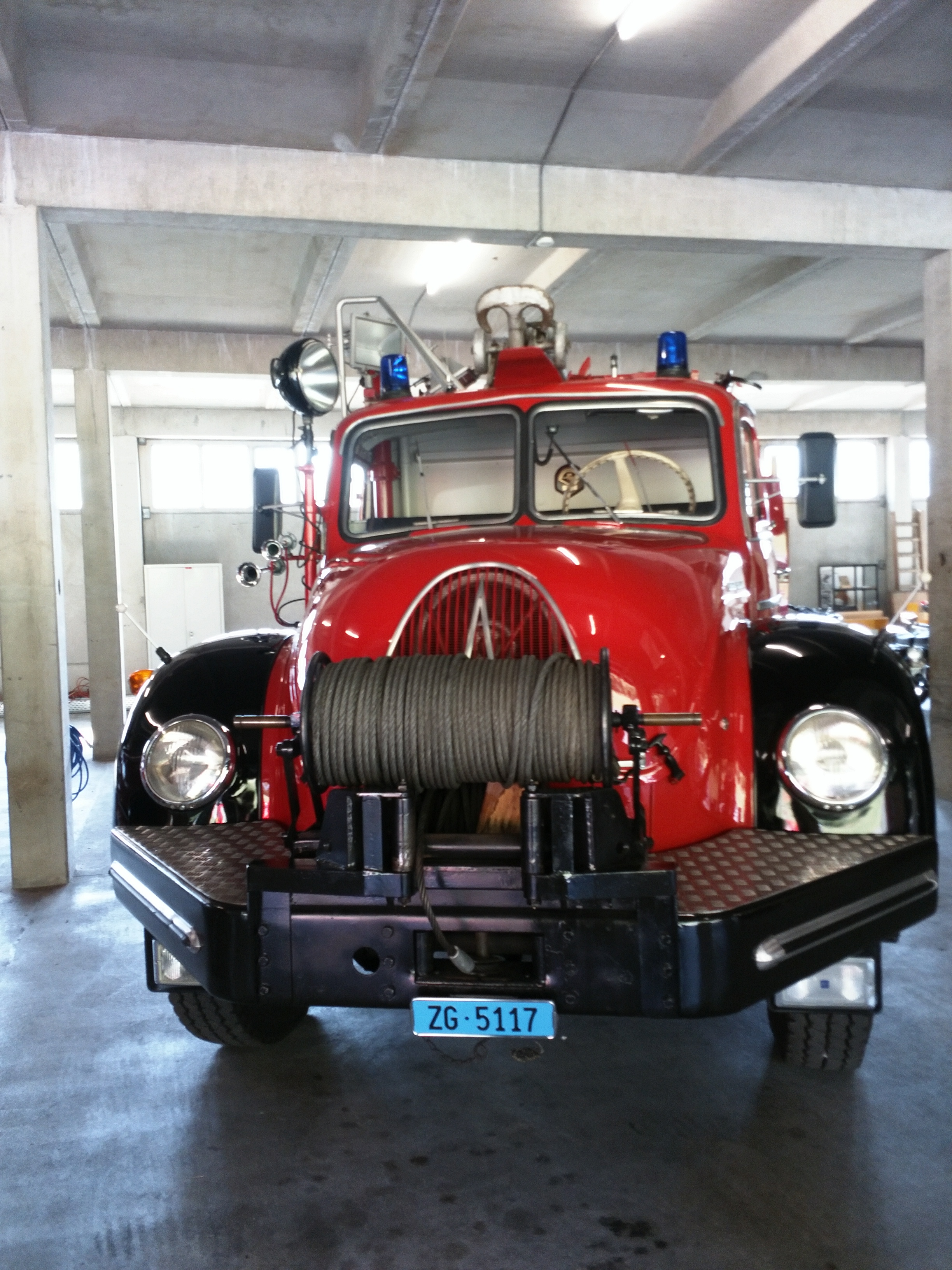 Magirus Deutz Muni front